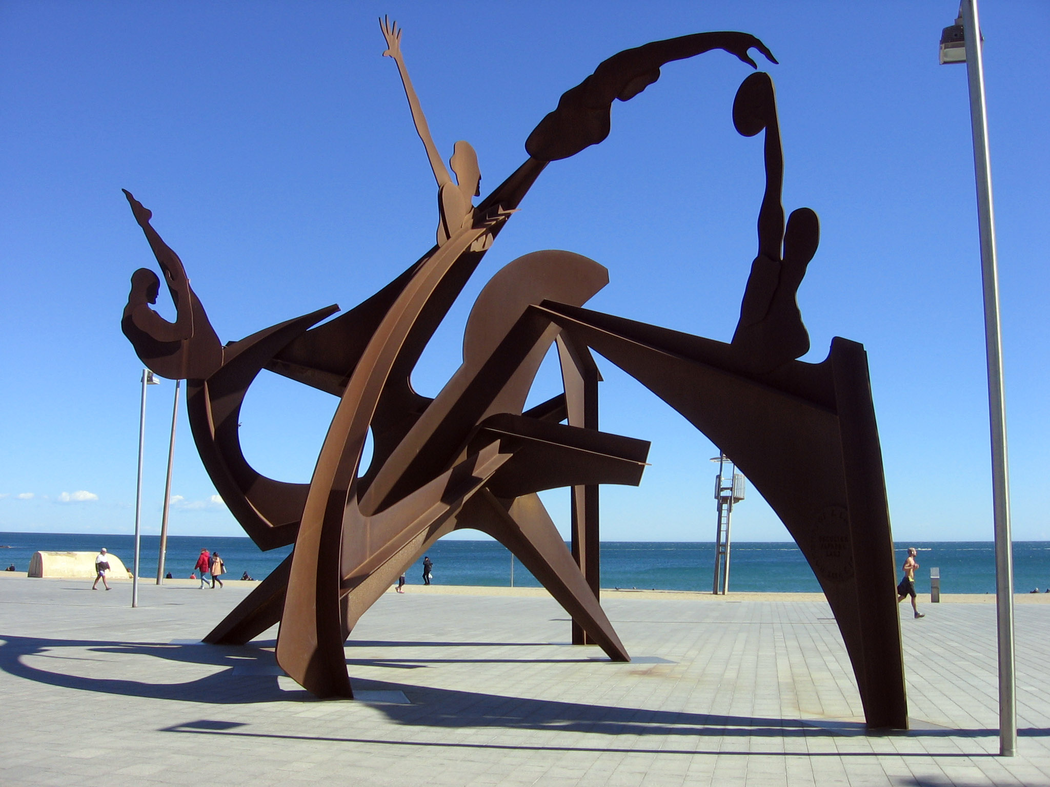 Homenaje a la natación (2004), de Alfredo Lanz, en la Plaza del Mar.